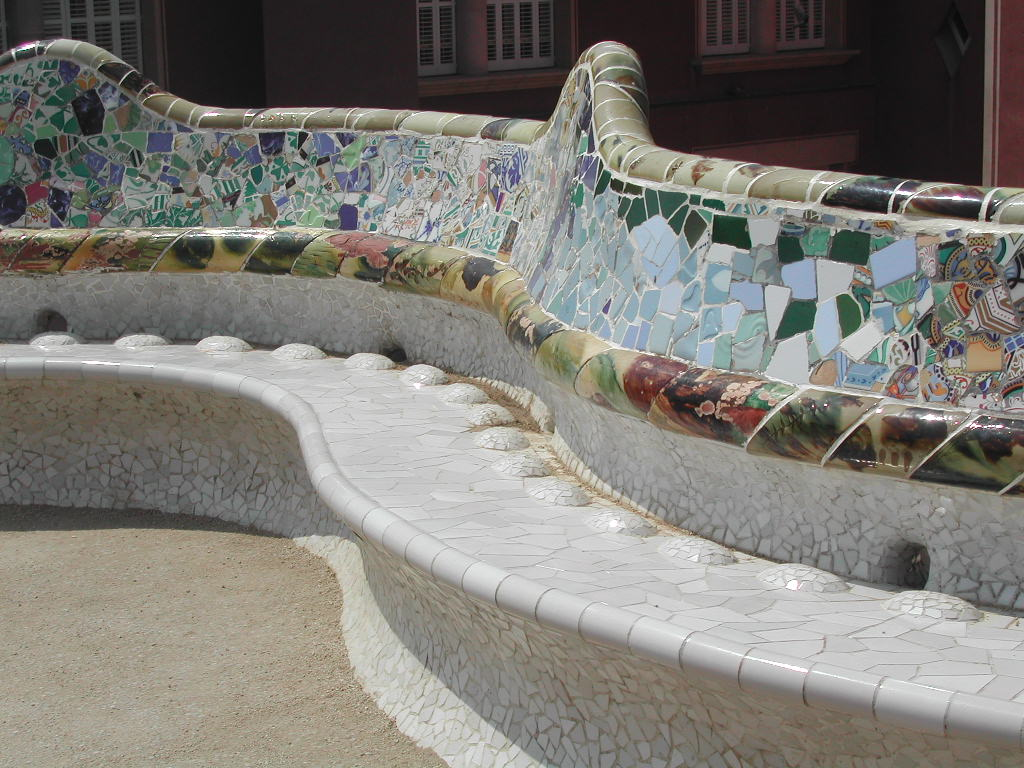 Parc Güell - Bänk op der Terass